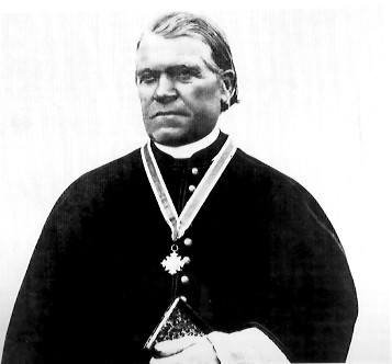 Johannes Ibach, Pfarrer preußischer Landtagsabgeordneter, 1869